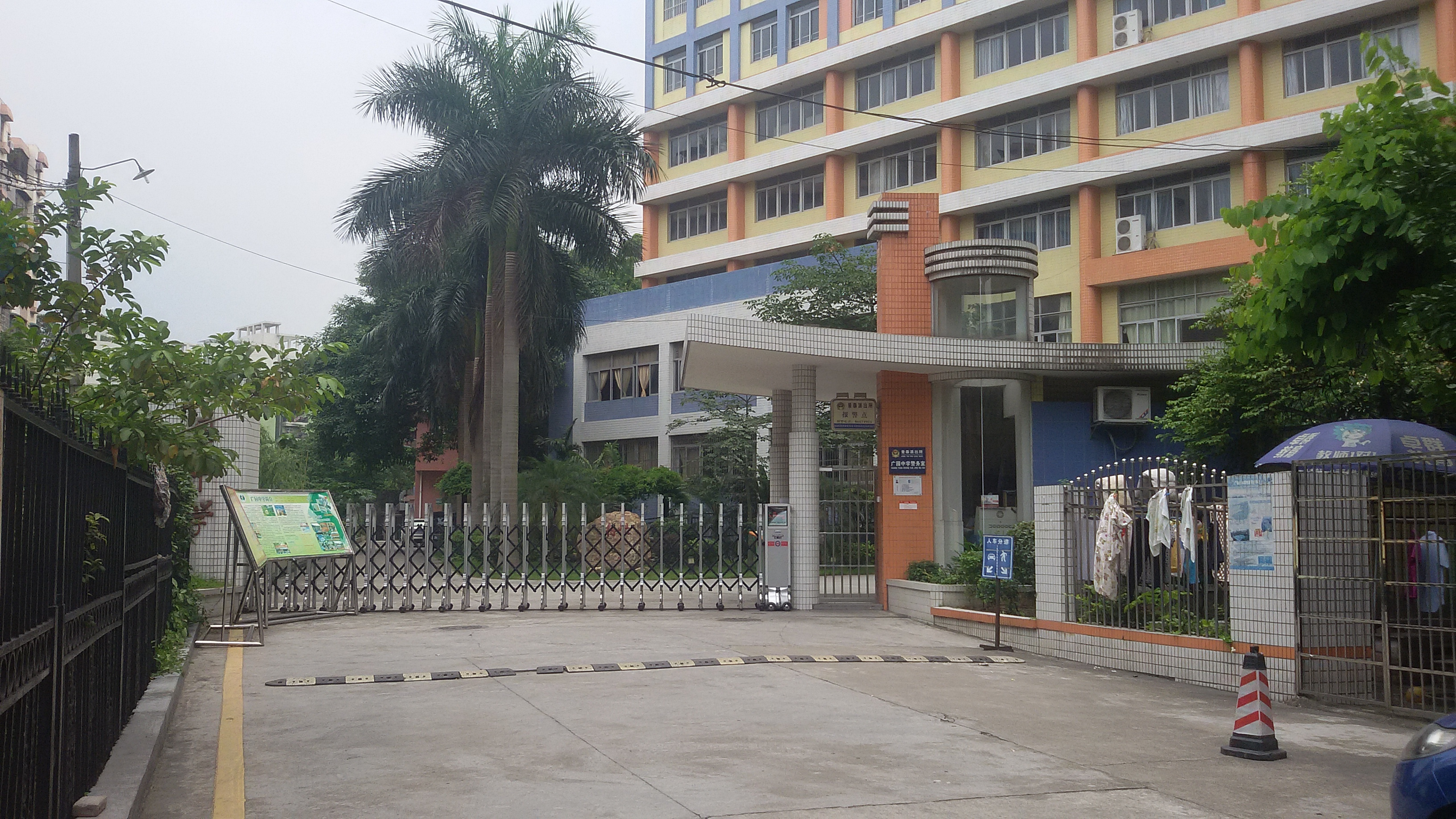 粵語: 广园中学嘅校门（正门）